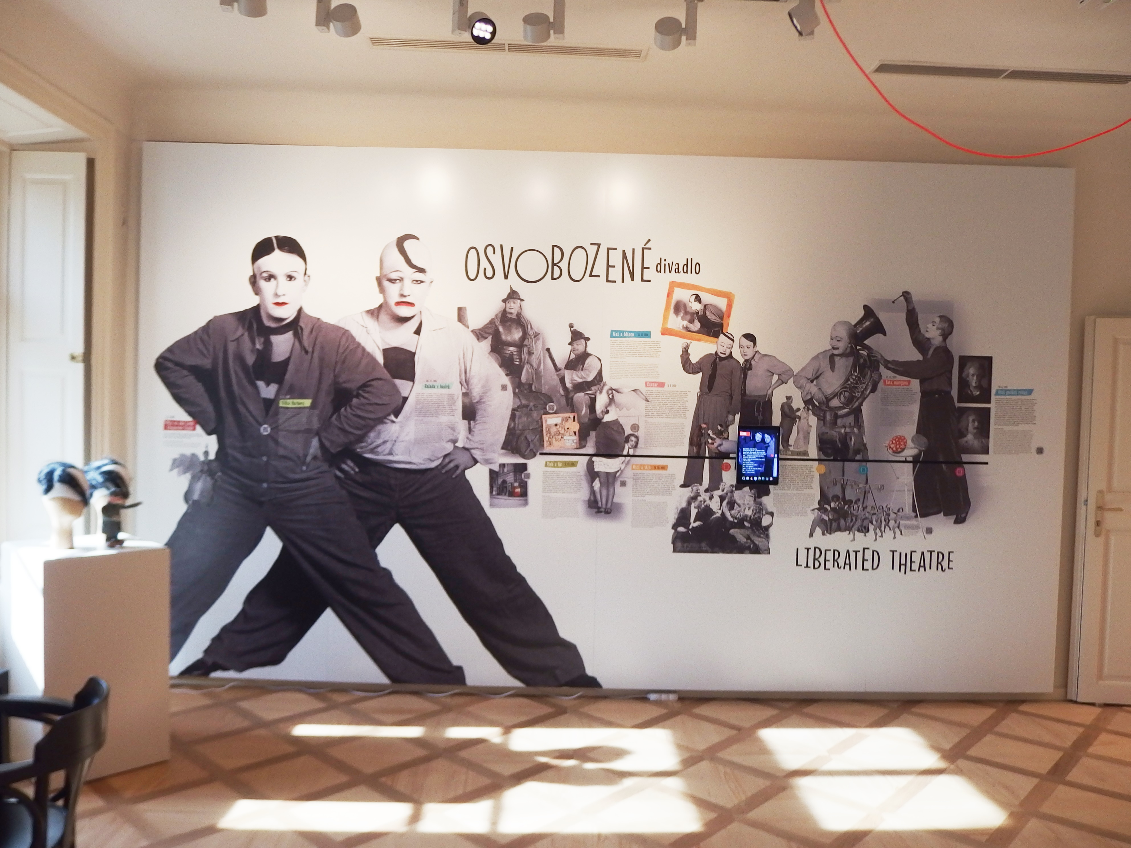 Werichova vila, U Sovových mlýnů 501/7, Praha-Malá Strana. Museum Kampa, stálá expozice, sklepní expozice a klubová zóna.